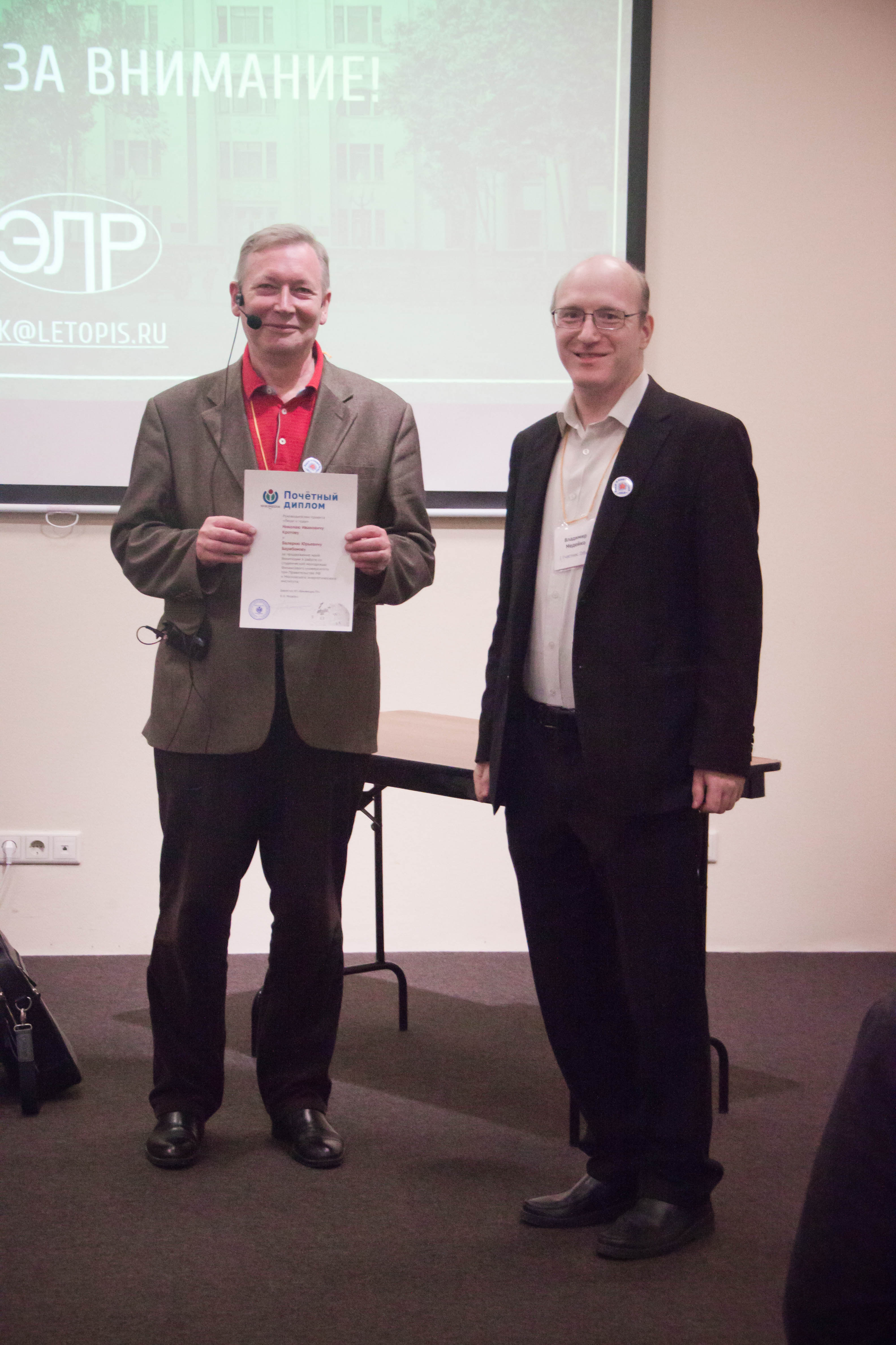 Директор НП "Викимедиа РУ" Владимир Медейко вручает Николаю Кротову Почётный диплом "Руководителям проекта «Люди и годы» Николаю Ивановичу Кротову и Валерию Юрьевичу Барабанову за продвижение идей Википедии в работе со студенческой молодежью Финансового университета при Правительстве РФ и Московского энергетического института."